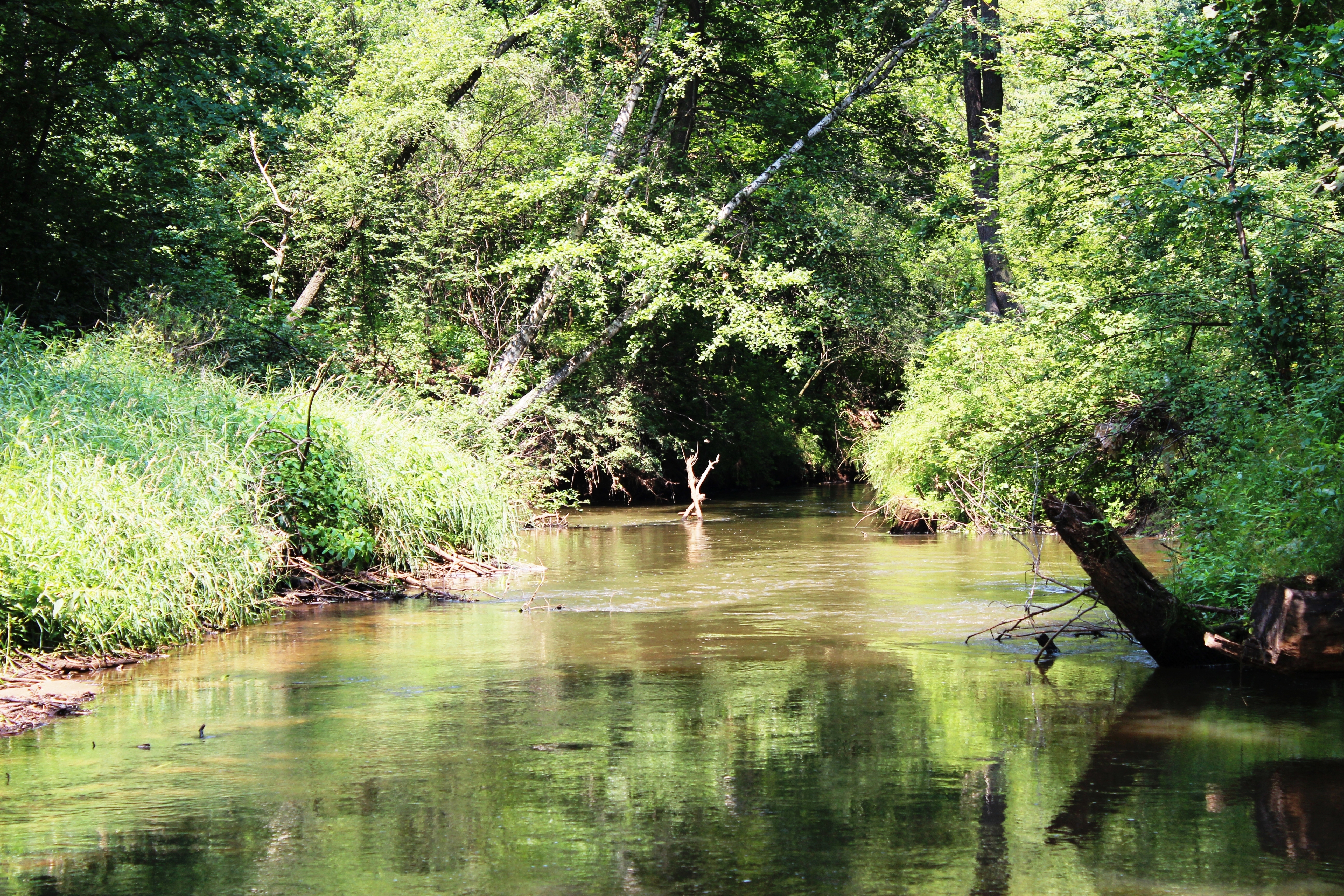 Rzeka Warta pomiędzy Poczesną a Zawodziem.